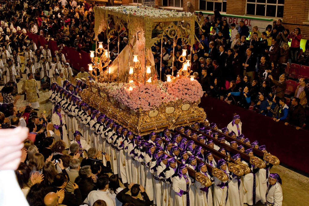 LA VIRGEN DE LA AMARGURA de Lorca, El dia que ella preside procesion, unico dia que desfila y cierra la procesión. (Paso Blanco)